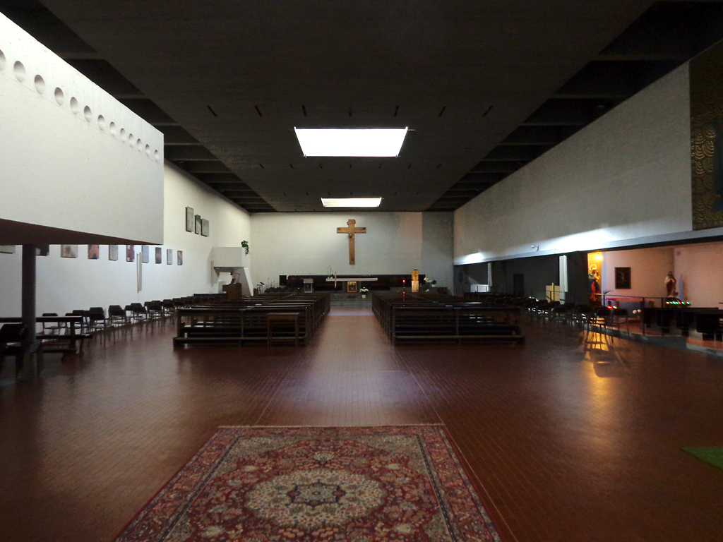 Milano, l'interno della chiesa del Sacro Cuore.